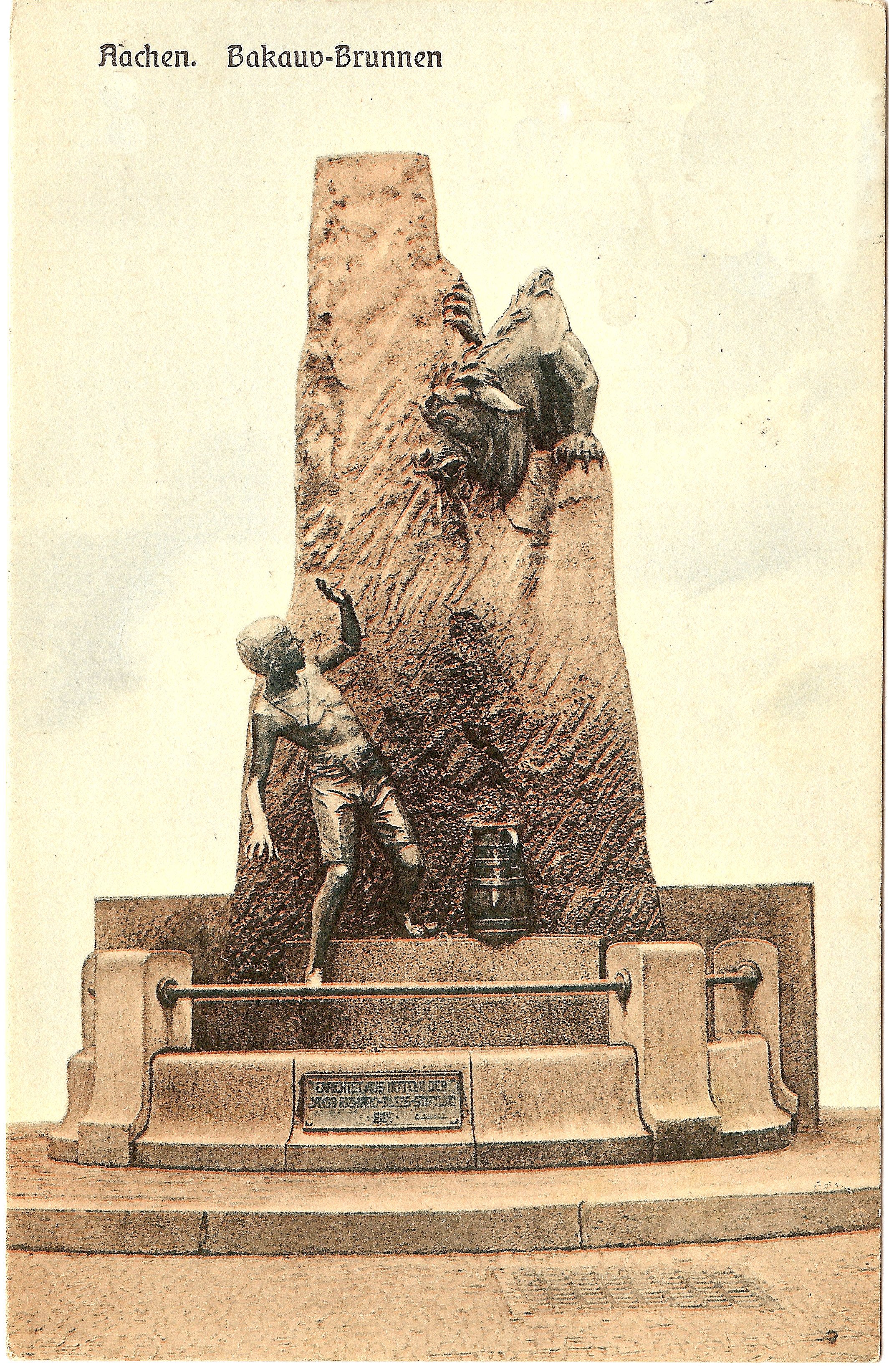 Bahkauv-Brunnen am Büchel in Aachen, 1904 errichtet. Entwurf Karl Kraus; im 2. Weltkrieg eingeschmolzen